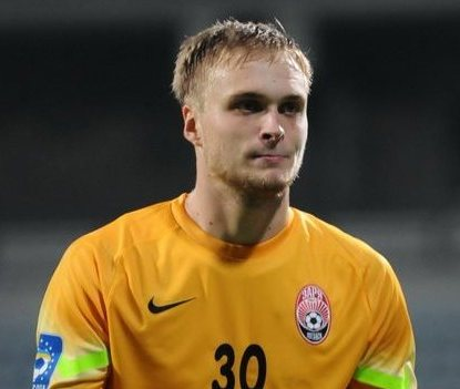 Микита Шевченко — український футбольний воротар під час виступів за «Зорю»